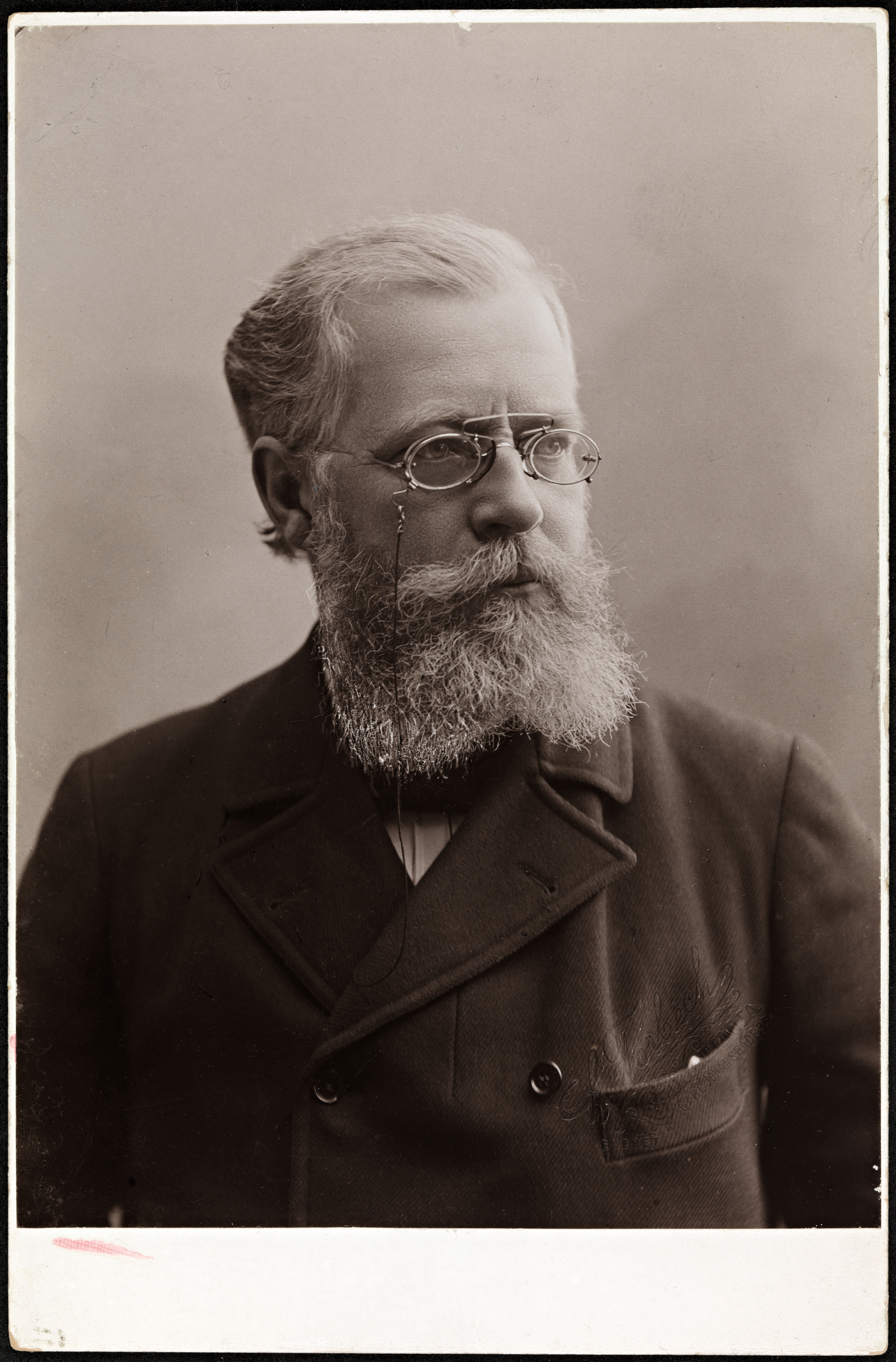 Tittel / Title: Portrett av Axel Charlot Drolsum (1846-1927) Beskrivelse / Description: Kabinettkort. Som sjef for Universitetsbiblioteket i Oslo 1876–1922, ledet Drolsum bibliotekets omdannelse og utbygging til et moderne forskningsbibliotek og planla biblioteksbygningen på Drammensveien, oppført 1911–13 Dato / Date: ukjent / unknown Fotograf / Photographer: L. Forbech (Christiania) Sted / Place: Oslo Eier / Owner Institution: Nasjonalbiblioteket / National Library of Norway Lenke / Link: Bildesignatur / Image Number: blds_05795